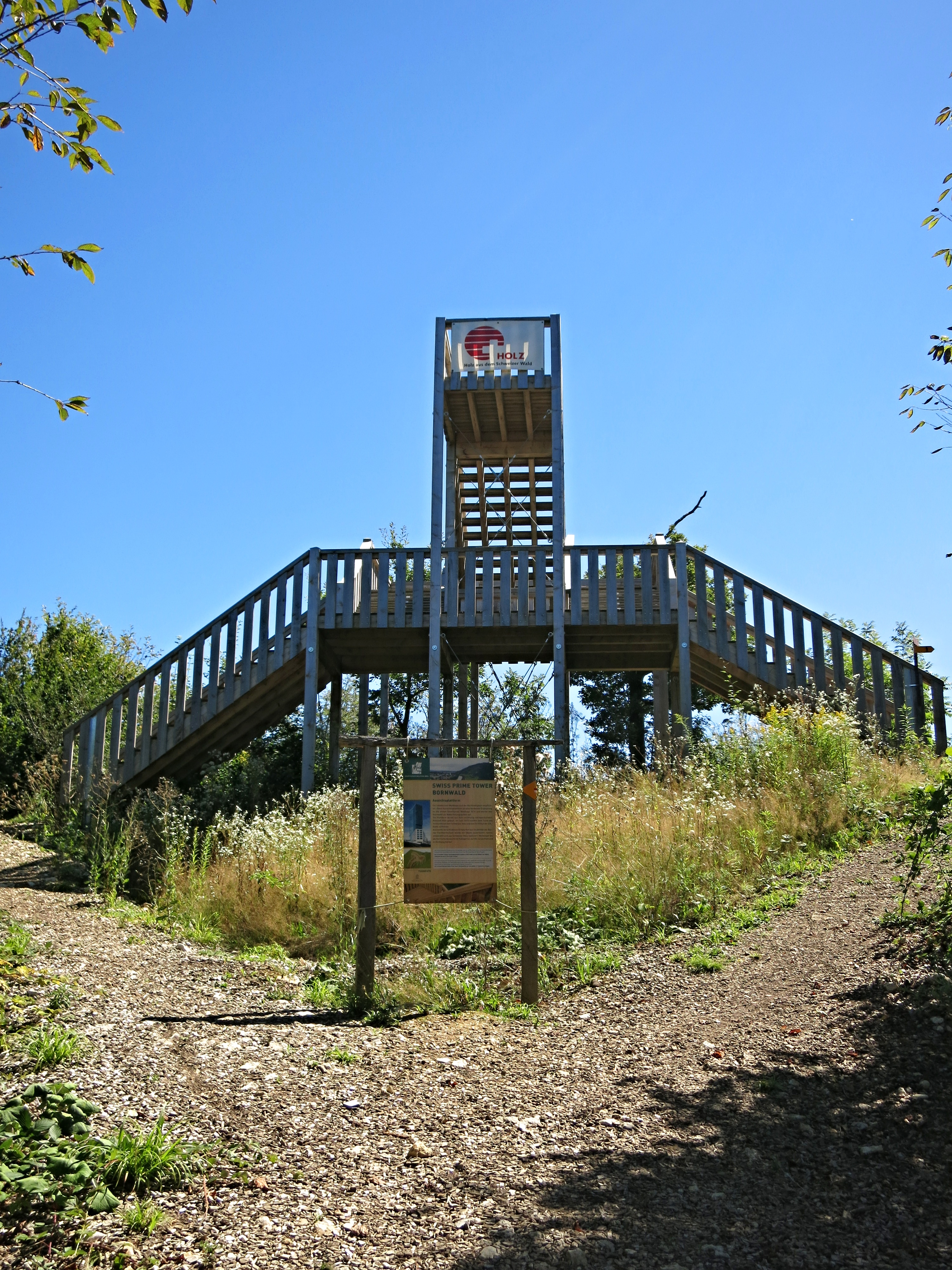 Swiss Prime Tower Bornwald